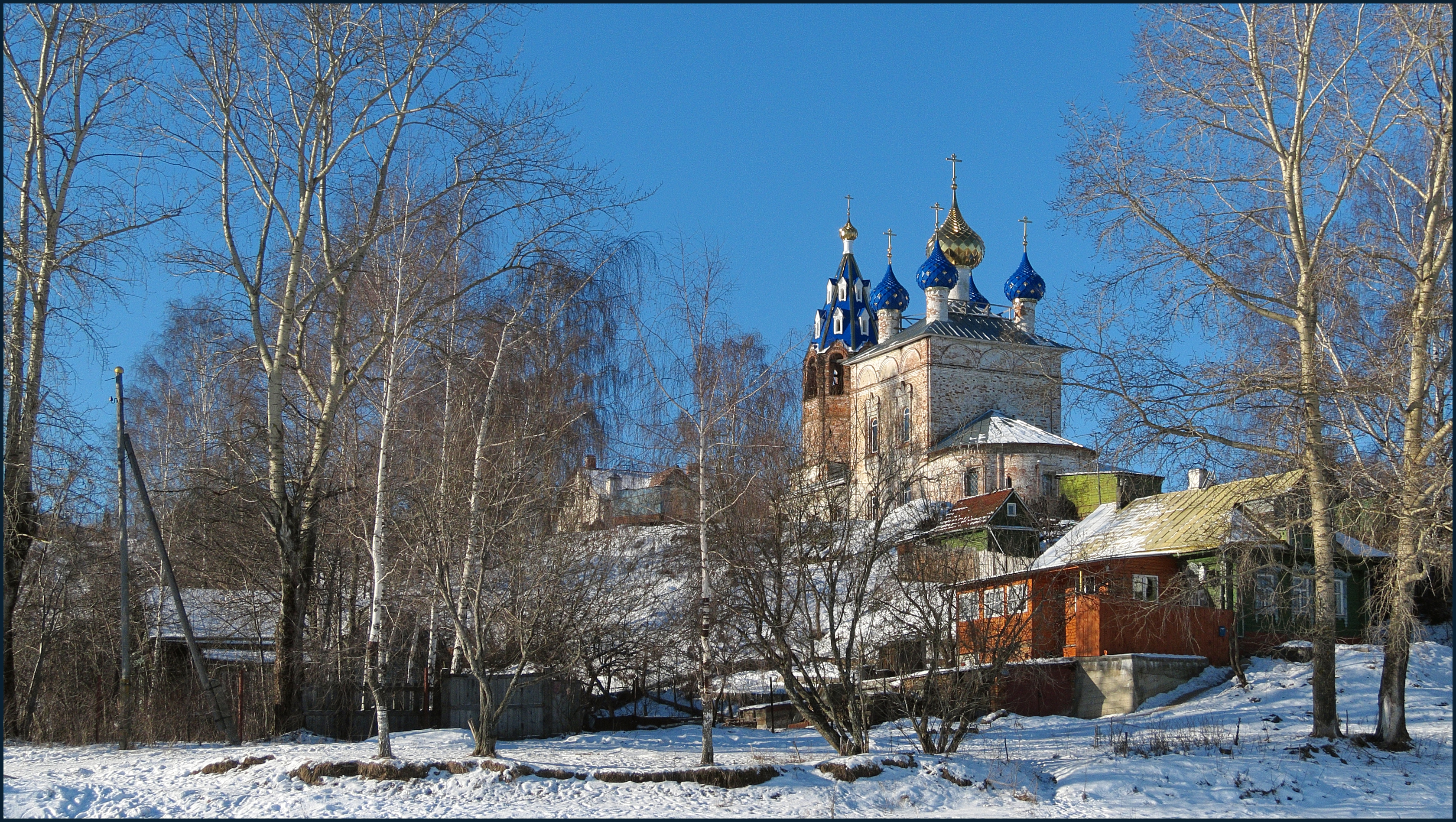 Церковь Успения (Ярославская область, Ярославль, Красноперевальская улица, 2)